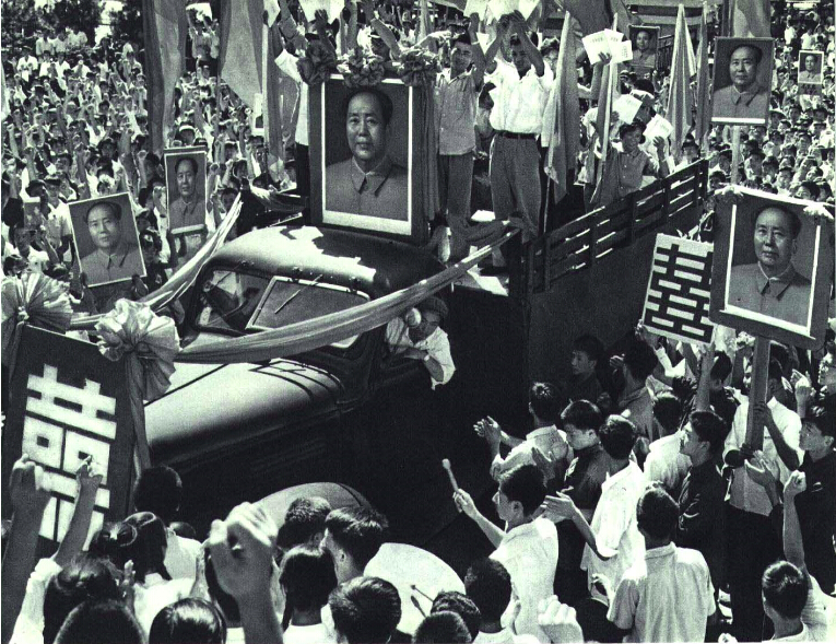 1966-11 1966年的婚礼场景